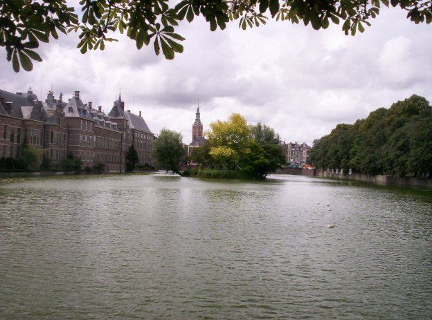 Hofvijver in Den Haag - eigen foto Gebruiker:Känsterle 13 juli 2004 public domain